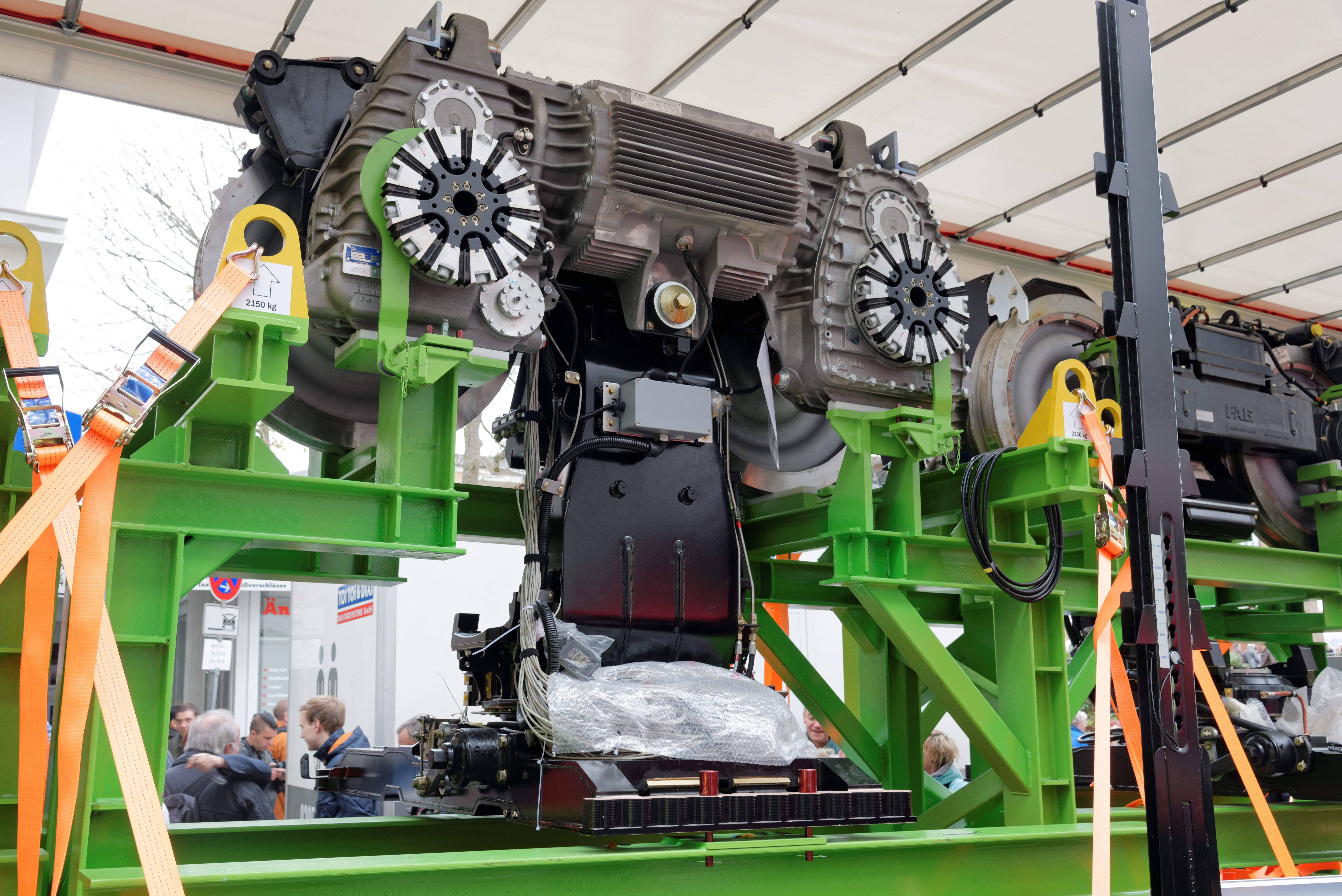 Antriebssatz einer neuen Schwebebahn in Wuppertal